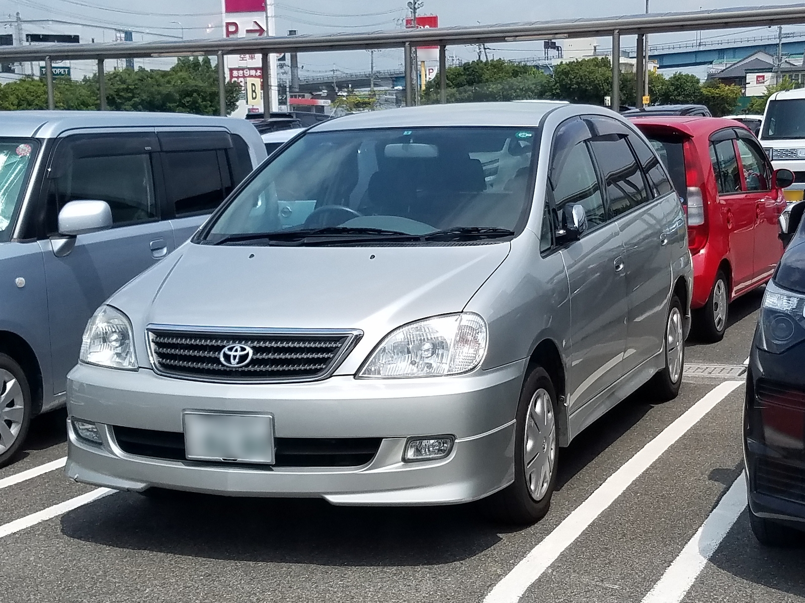 ナディア S(後期型）